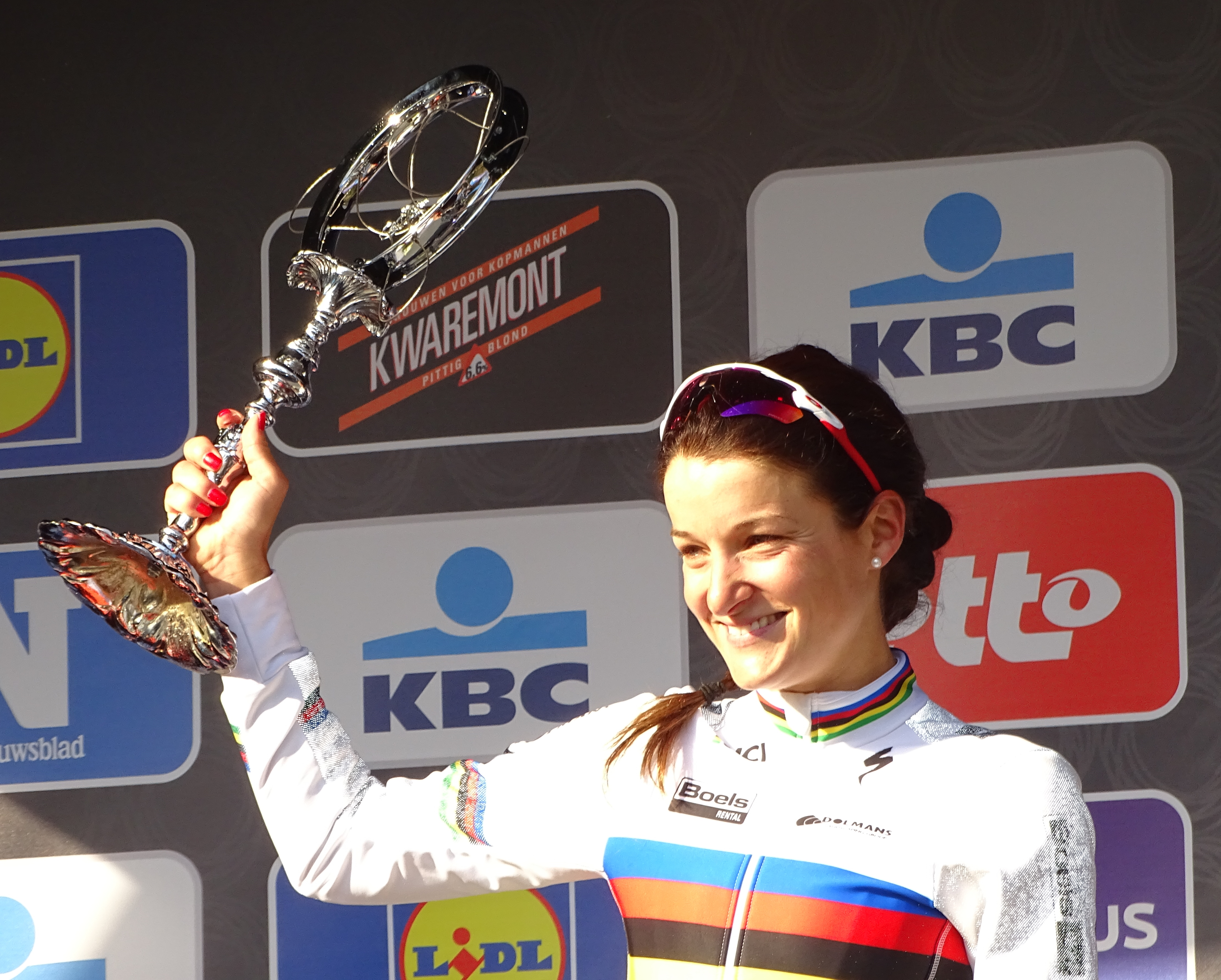 Reportage réalisé le samedi 27 février à l'occasion du départ et de l'arrivée du Circuit Het Nieuwsblad 2016 et de l'arrivée du Circuit Het Nieuwsblad féminin 2016 à Gand, Belgique.